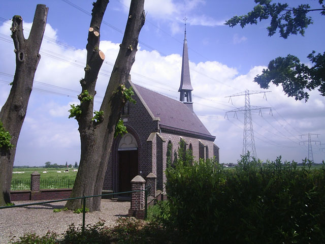 Sint Annakapel te Ohé en Laak, foto eigen werk